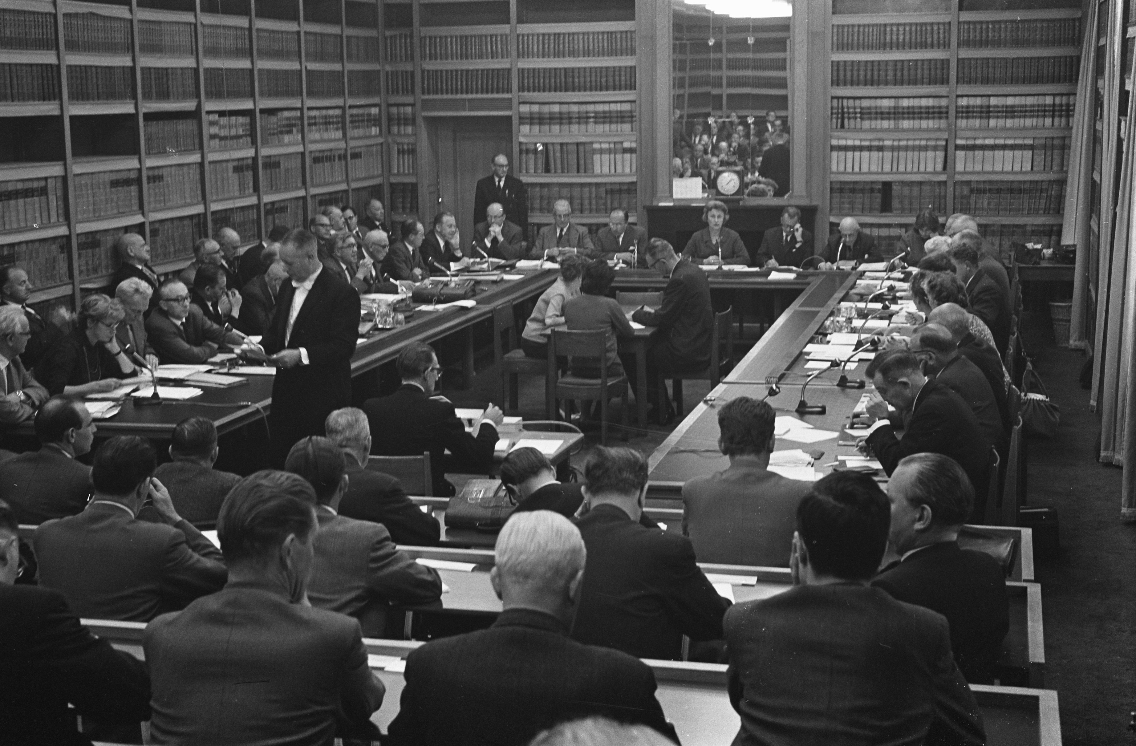 Collectie / Archief : Fotocollectie Anefo Reportage / Serie : [ onbekend ] Beschrijving : Commissie van Onderwijs in gebouw van Tweede Kamer bijeen Datum : 24 oktober 1962 Trefwoorden : commissies, gebouwen Instellingsnaam : Tweede Kamer Fotograaf : Pot, Harry / Anefo Auteursrechthebbende : Nationaal Archief Materiaalsoort : Negatief (zwart/wit) Nummer archiefinventaris : bekijk toegang 2.24.01.05 Bestanddeelnummer : 914-4423